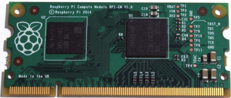 Raspberry Pi Compute Module - version 1Compute Module Board v.1.0 (CM1), 2014